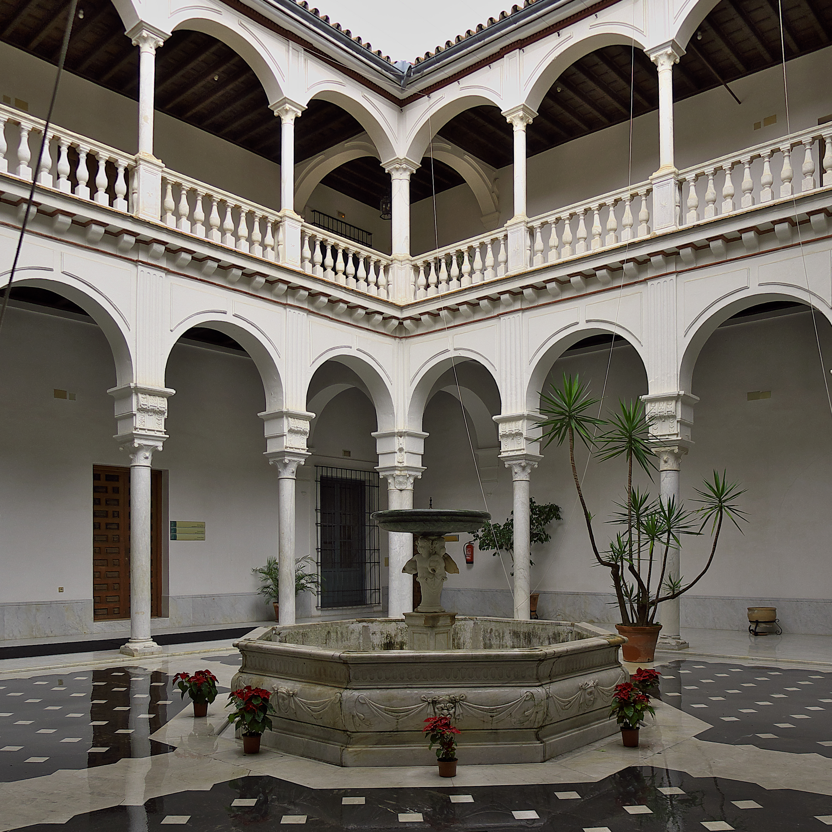 Tomás de Mañara Leca y Colonna compra la casa-palacio a Diego de Almanza (1623)